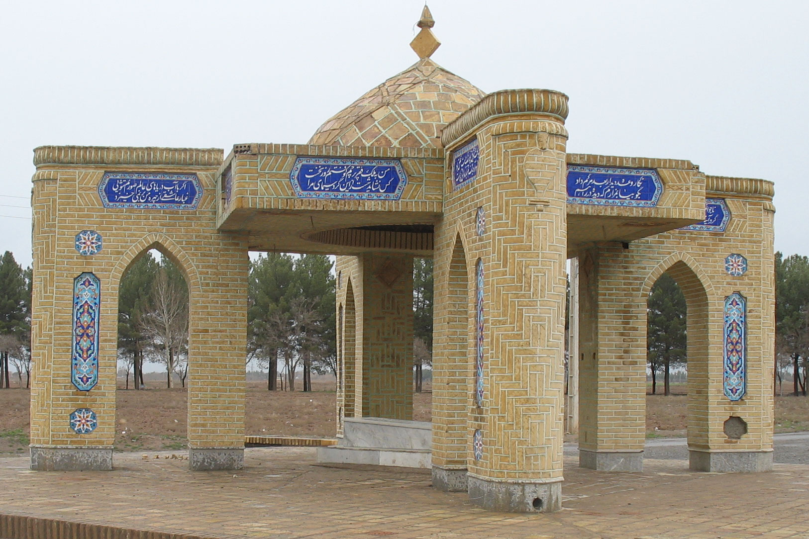 Heydar Yaghma tomb in Neyshabur